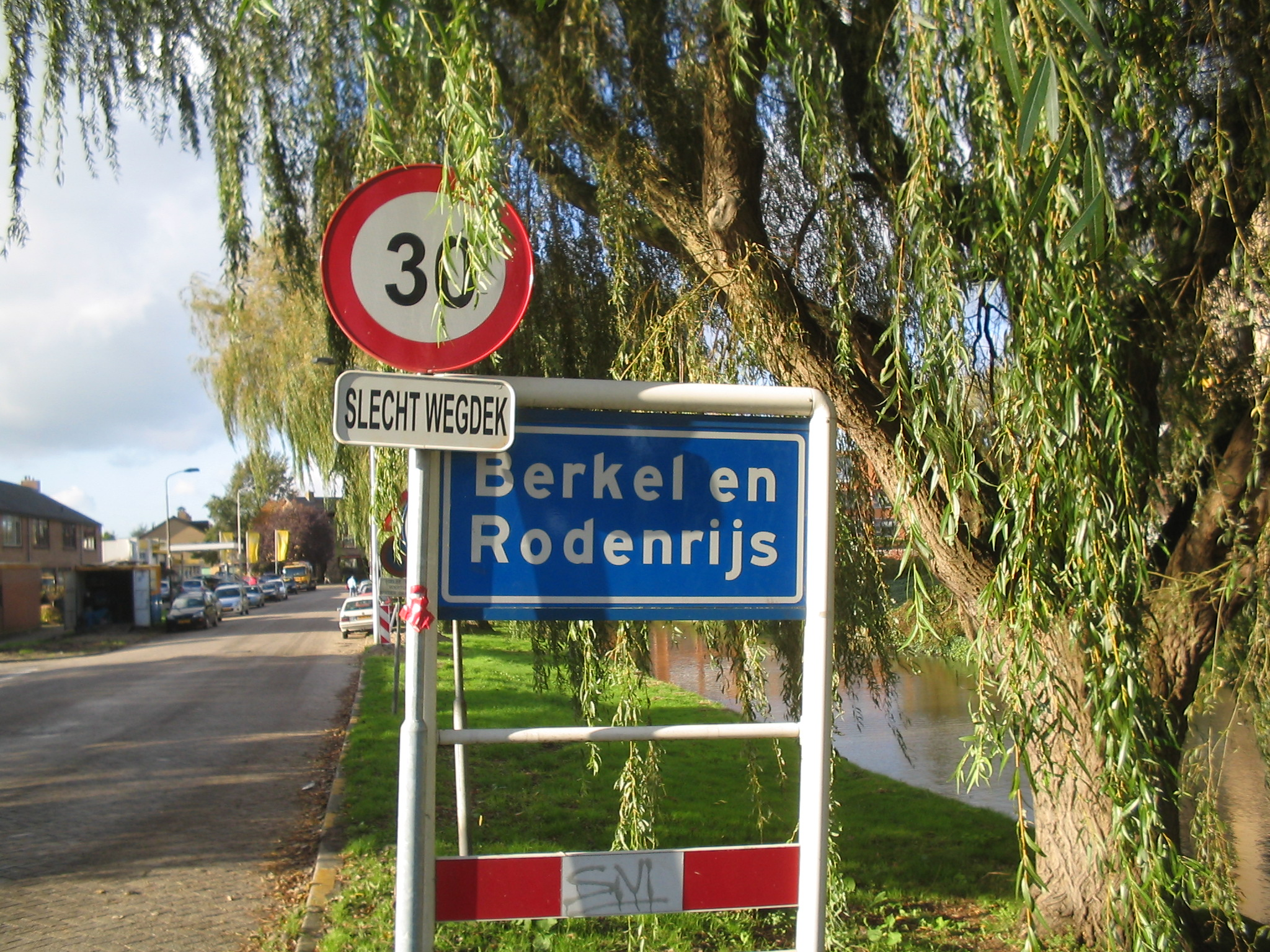 Berkel en Rodenrijs bord, 7 november 2005